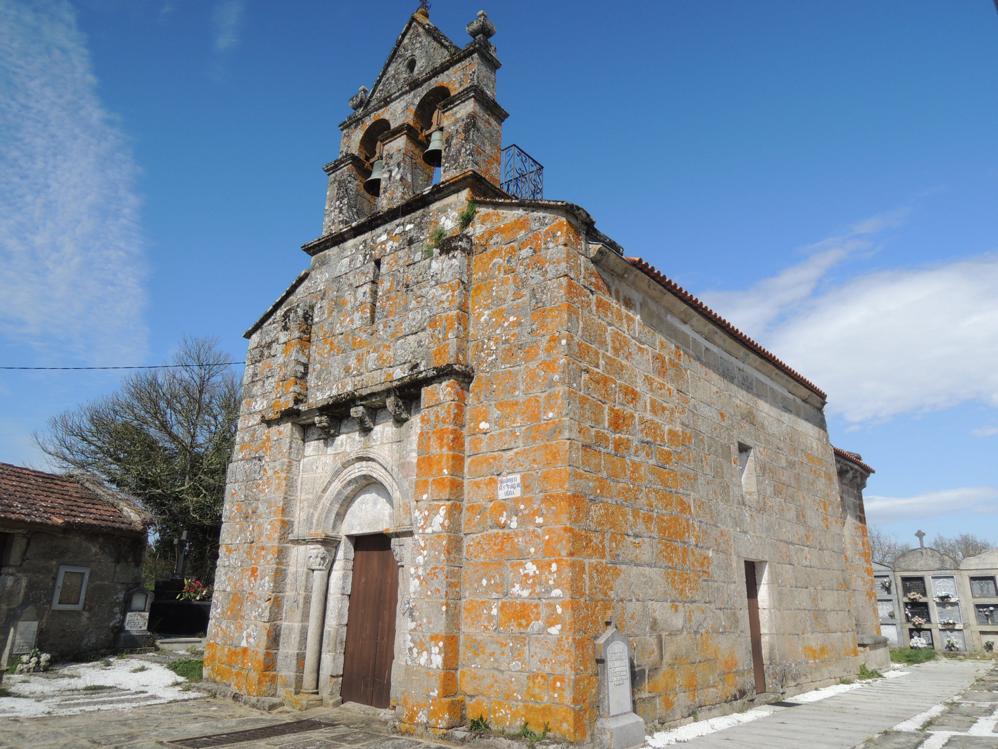 Igrexa de Santa María de Vilela, Punxín